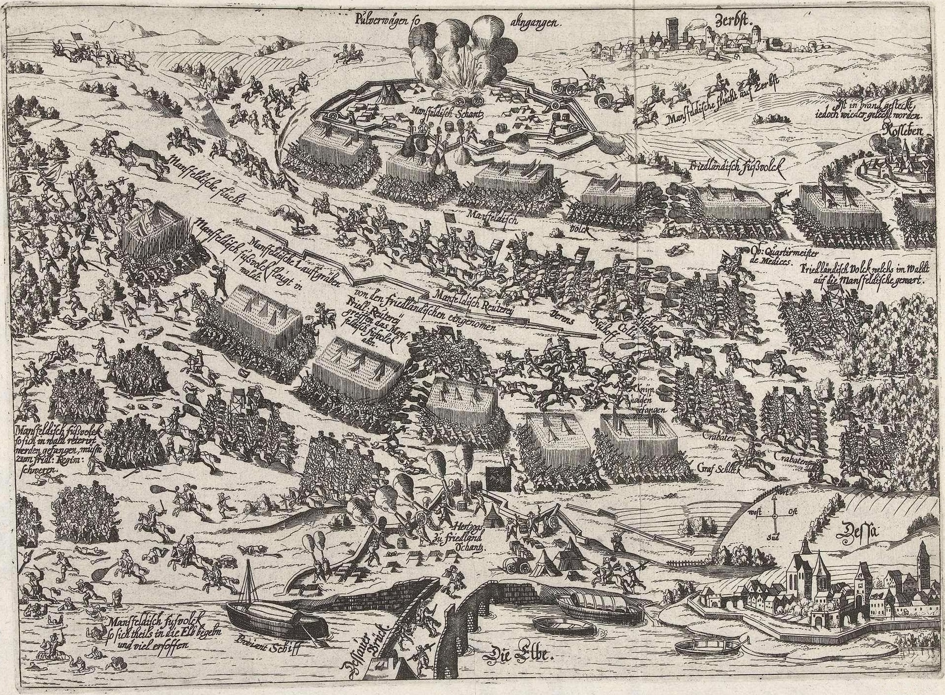 Slag bij Dessau, aan de Dessauer Brücke, 25 april 1626, waarbij het keizerlijke leger onder Wallenstein een verpletterende overwinning op de troepen onder de graaf van Mansfeld behaalt. Zonder onderschrift. Rechtsonder met pen genummerd: 420. De prent maakt deel uit van een album.